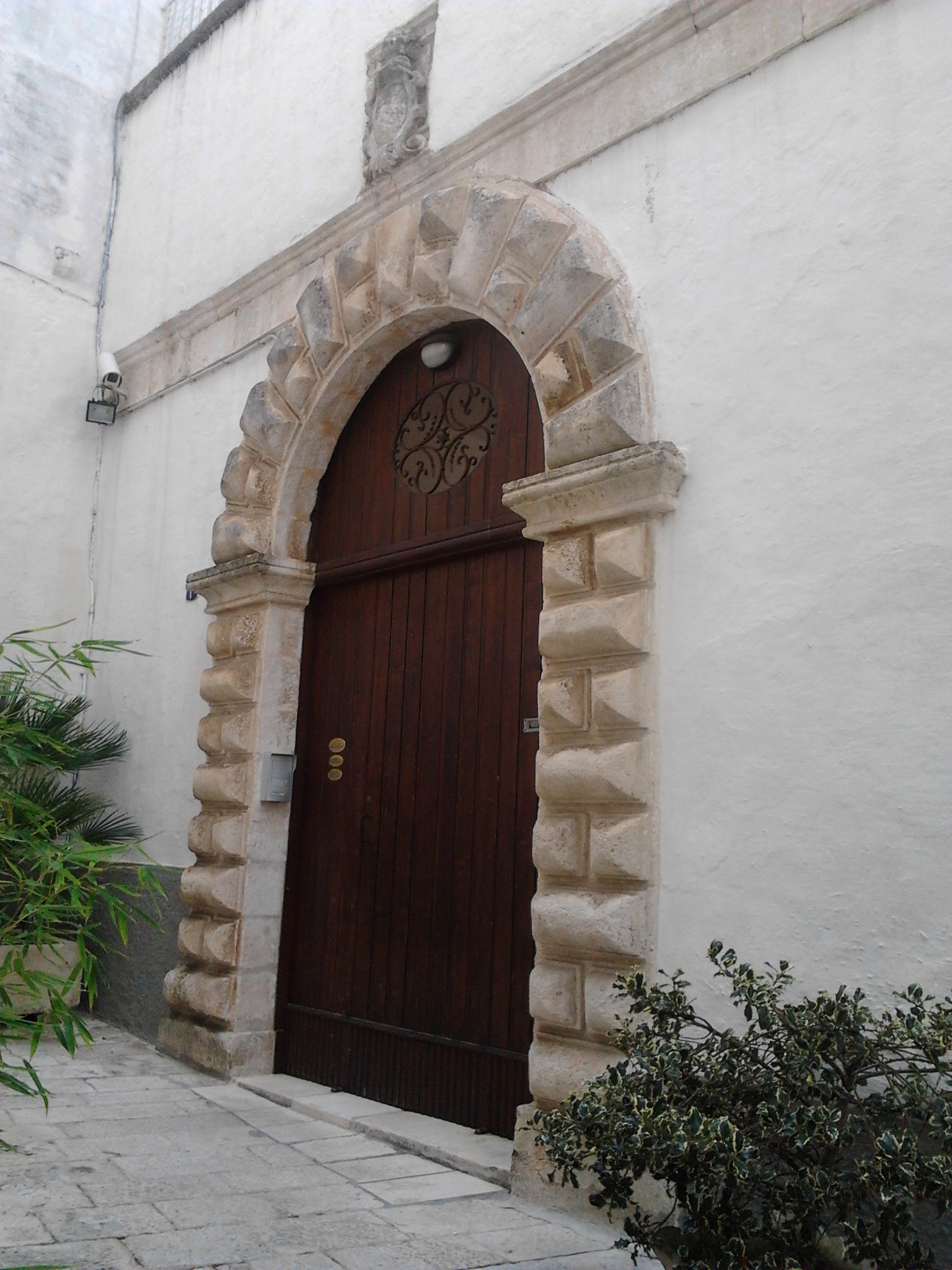 Conservatorio di Santa Maria della Misericordia, già Palazzo Turnone (Martina Franca).